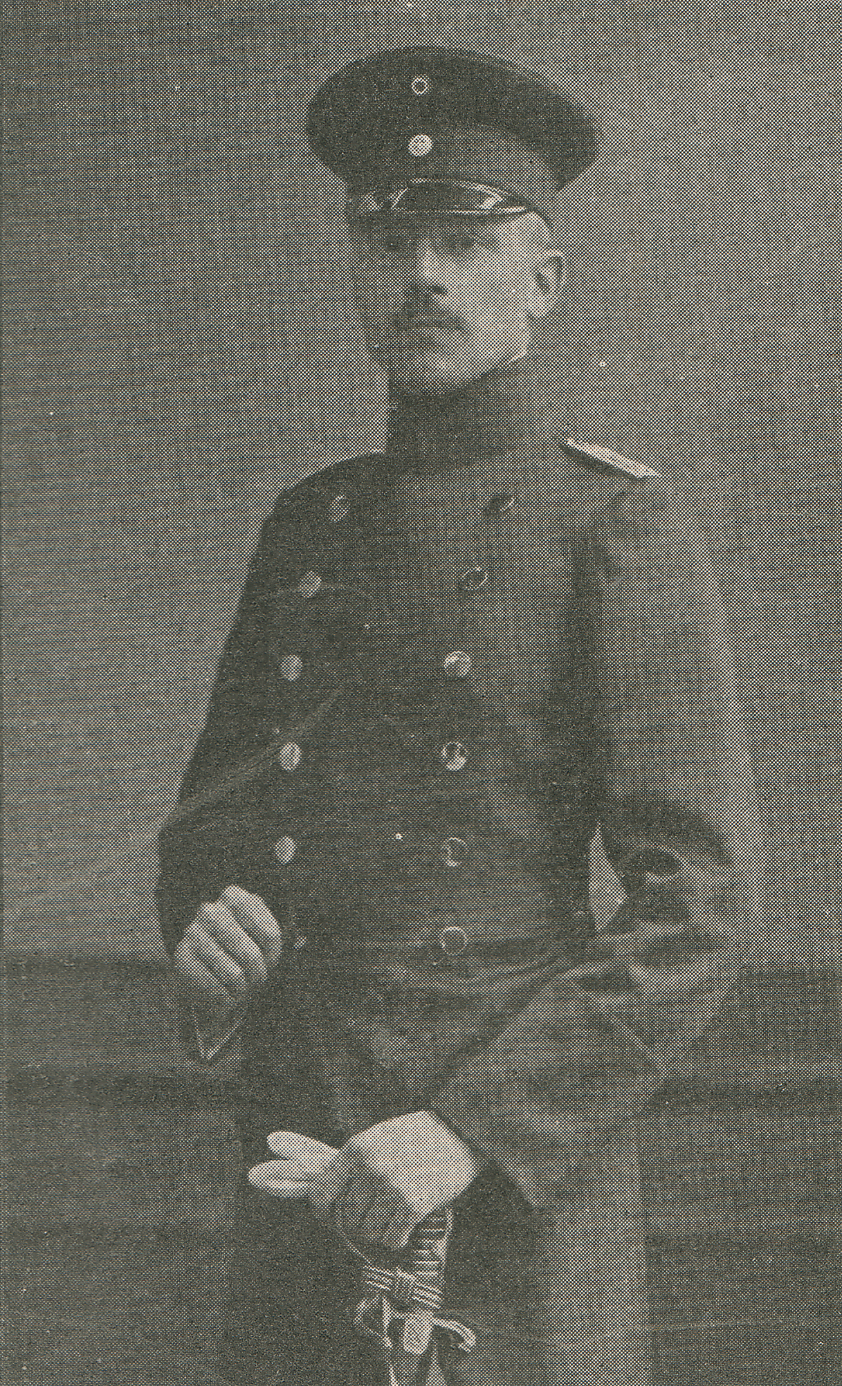 Fur Trade Review November 1914.